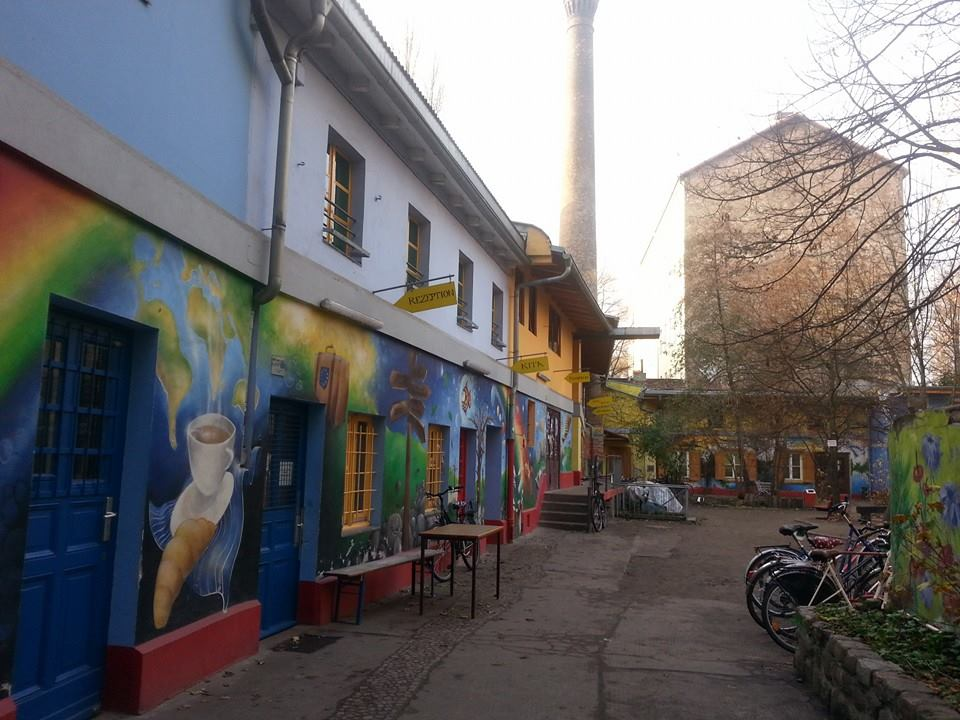 Regenbogenfabrik (Eingangsbereich) - 1981 besetztes und heute legales Alternativprojekt in Berlin-Kreuzberg, Germany.